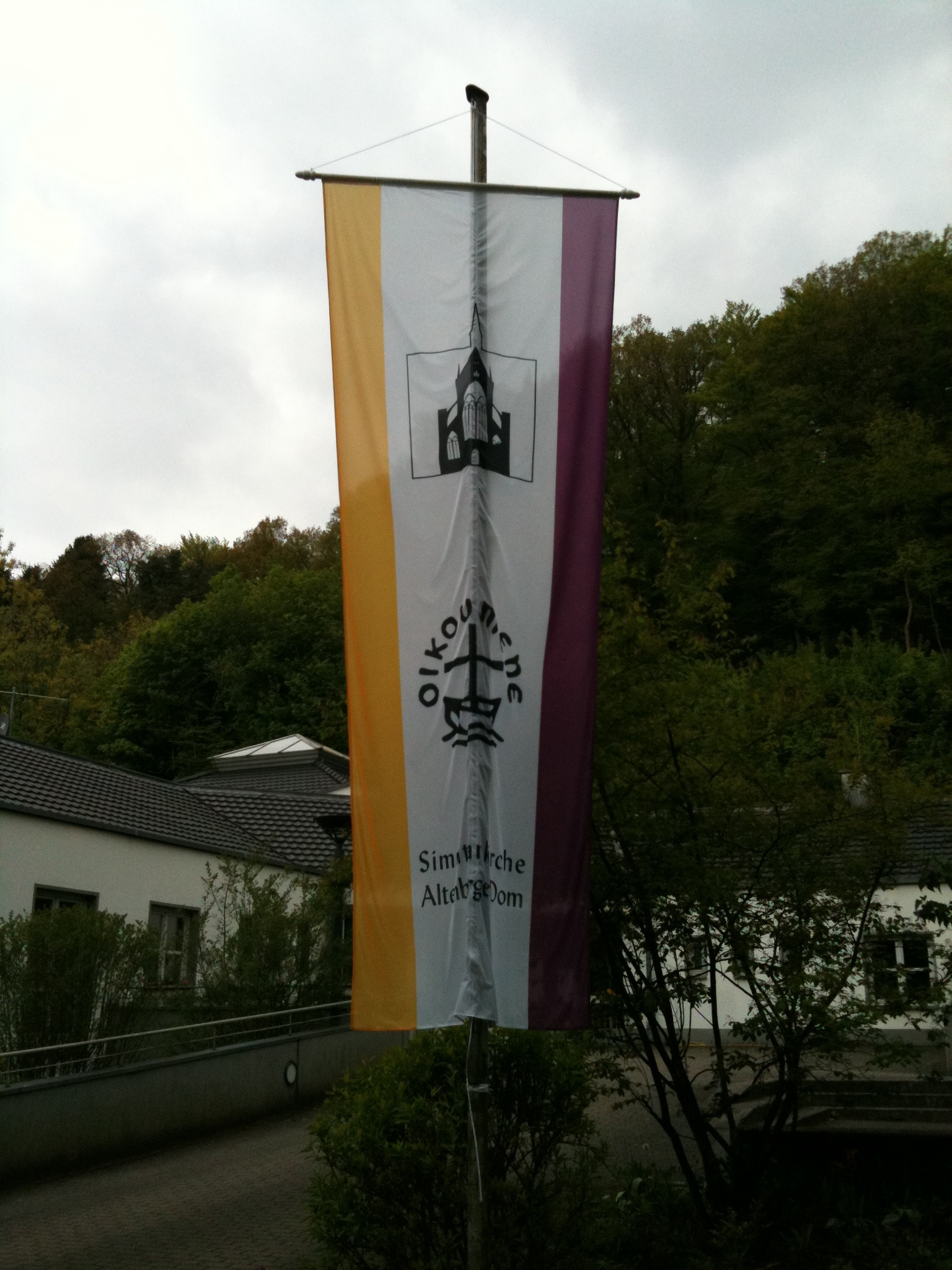 Fahne der Simultankirche Altenberger Dom vor dem Lutherhaus in Altenberg. Die Fahne kombiniertdie Farben Gelb-Weiß der römisch-katholischen Fahne und Weiß-Violett der evangelischen Fahne